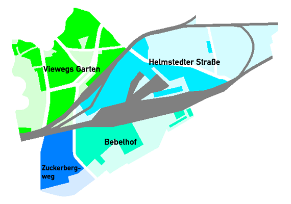 Stadtteile/Quartiere im Stadtbezirk Viewegs Garten-Bebelhof (Braunschweig)